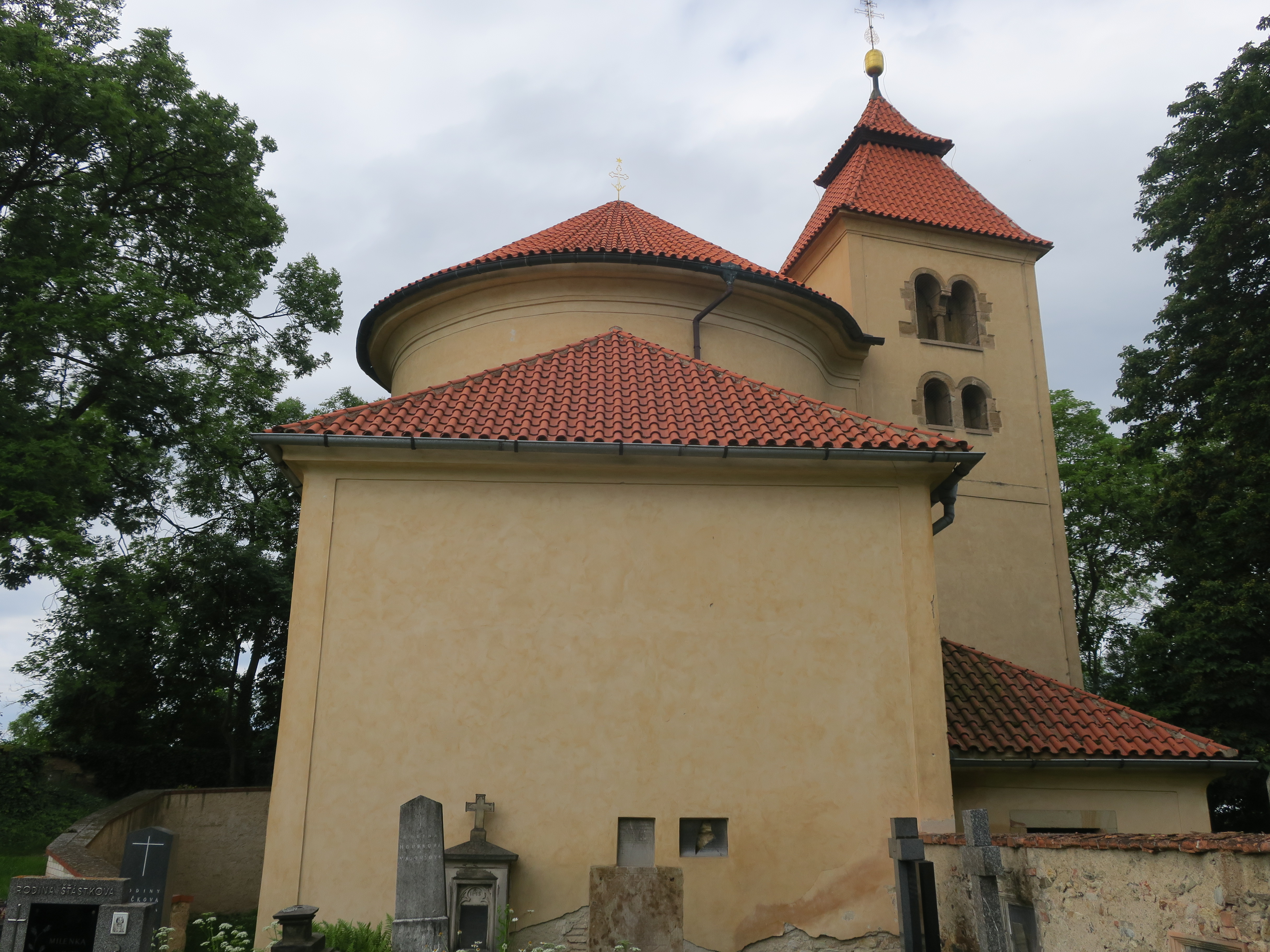 Kostel svatého Petra a Pavla na Budči, Zákolany, okres Kladno